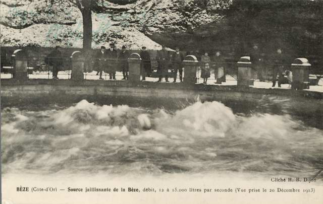 Carte postale sur la crue de la Bèze à Bèze, le 20 décembre 1913.